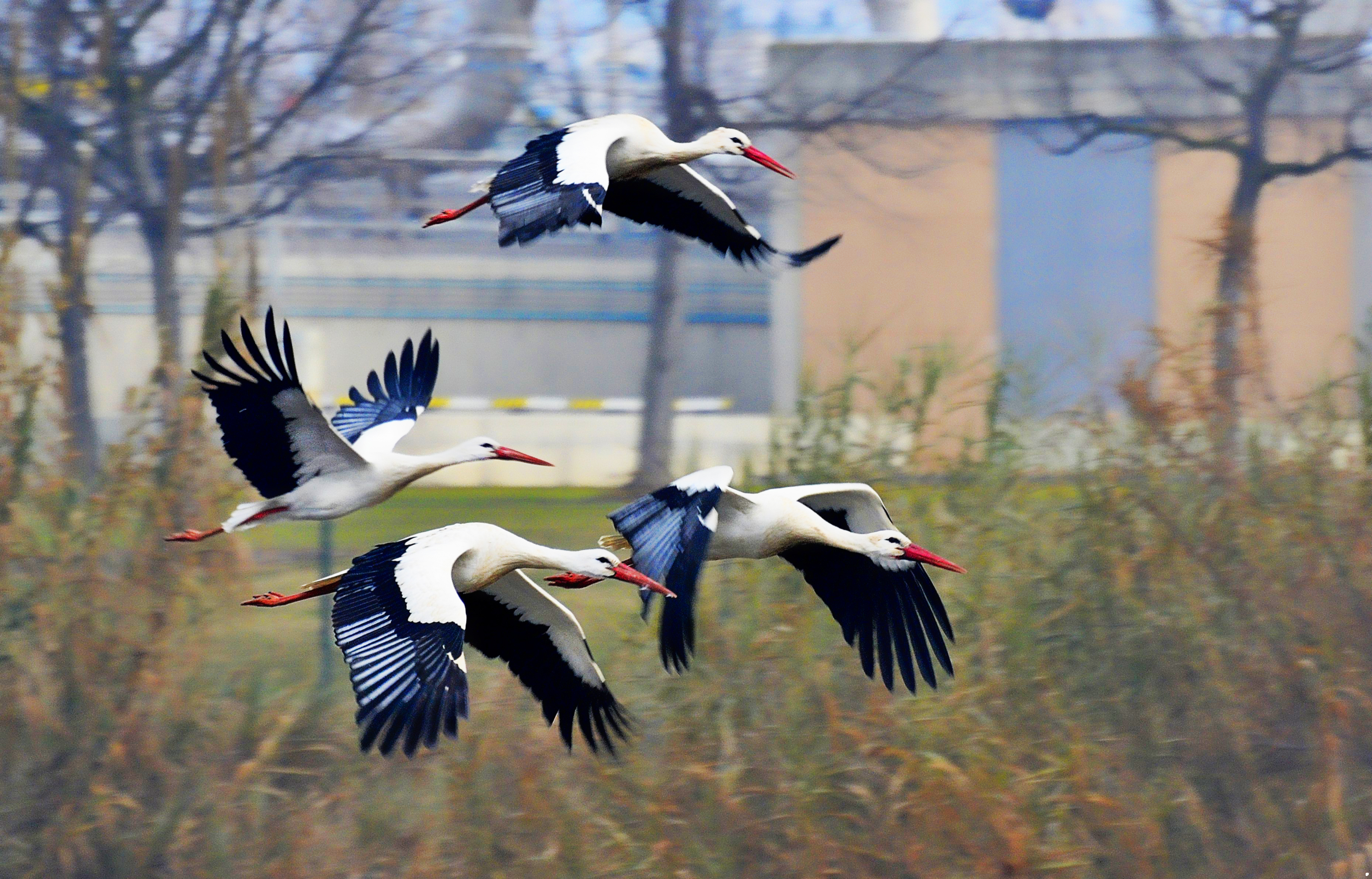 Cigüeñas blancas en magestuoso vuelo.